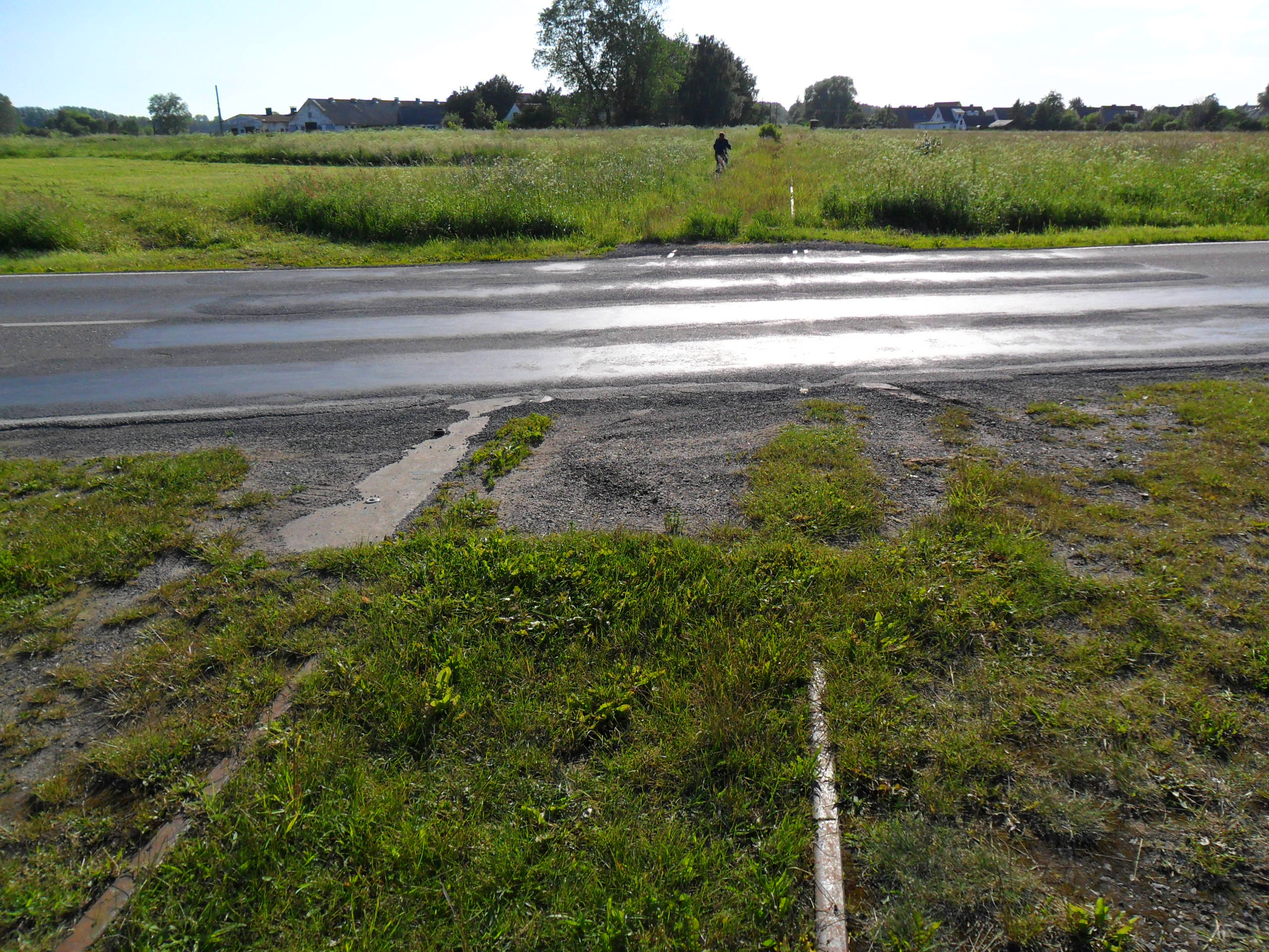 Überbauter Bahnübergang Darßbahn